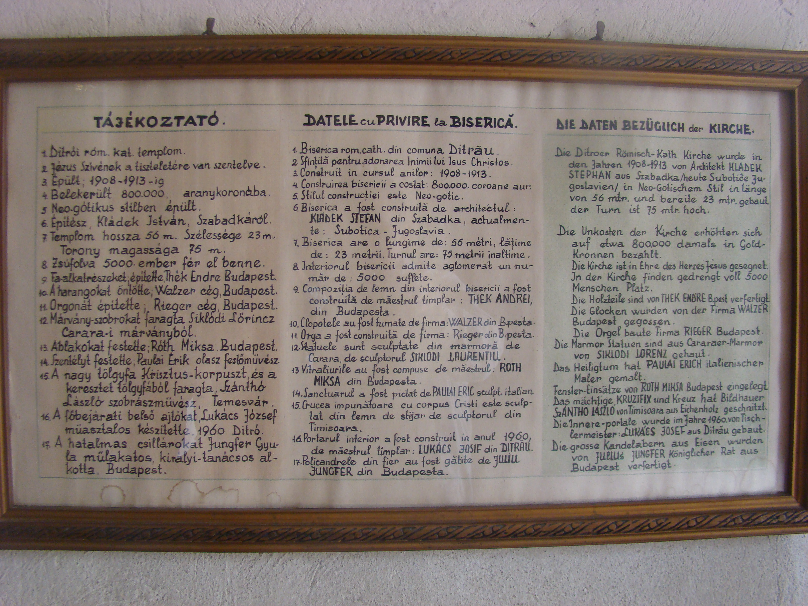 Ditrău, județul Harghita